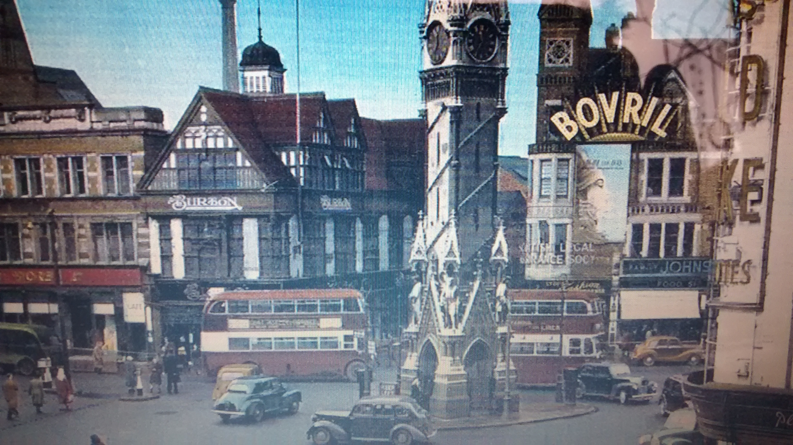 Leicester